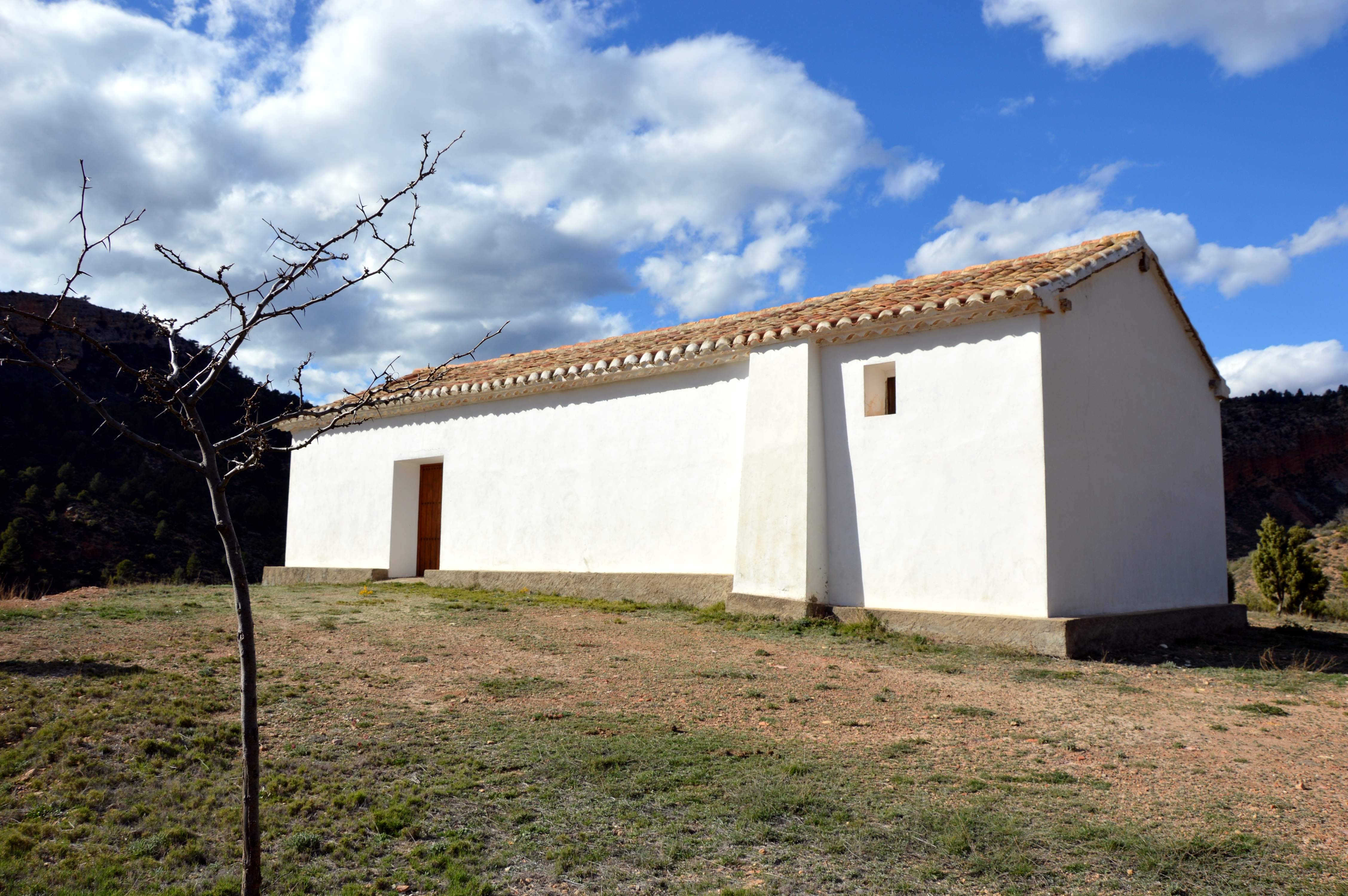 Vista general (suroriental) de la Ermita de Santa María en Tramacastiel (Teruel).